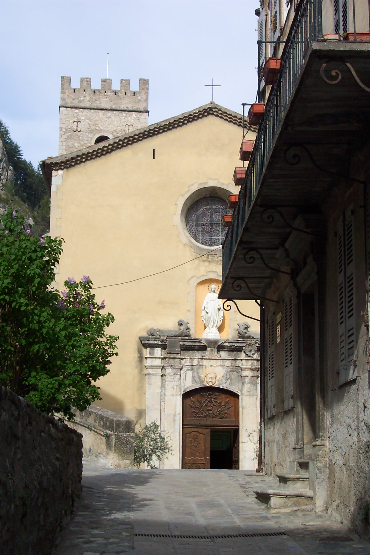 La place de l'église